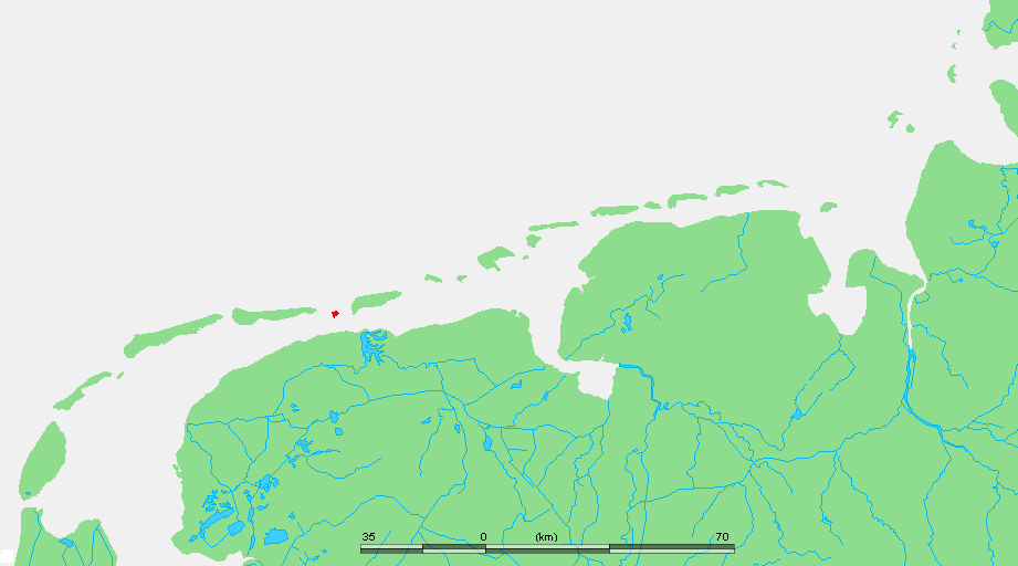 Wadden - Engelsmanplaat.PNG